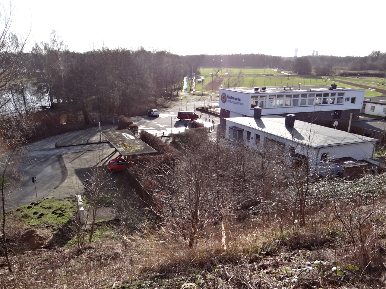 Sportgelände im Kennel, bis 2012 MTV Braunschweig, danach Nachwuchsleistungszentrum Eintracht Braunschweig